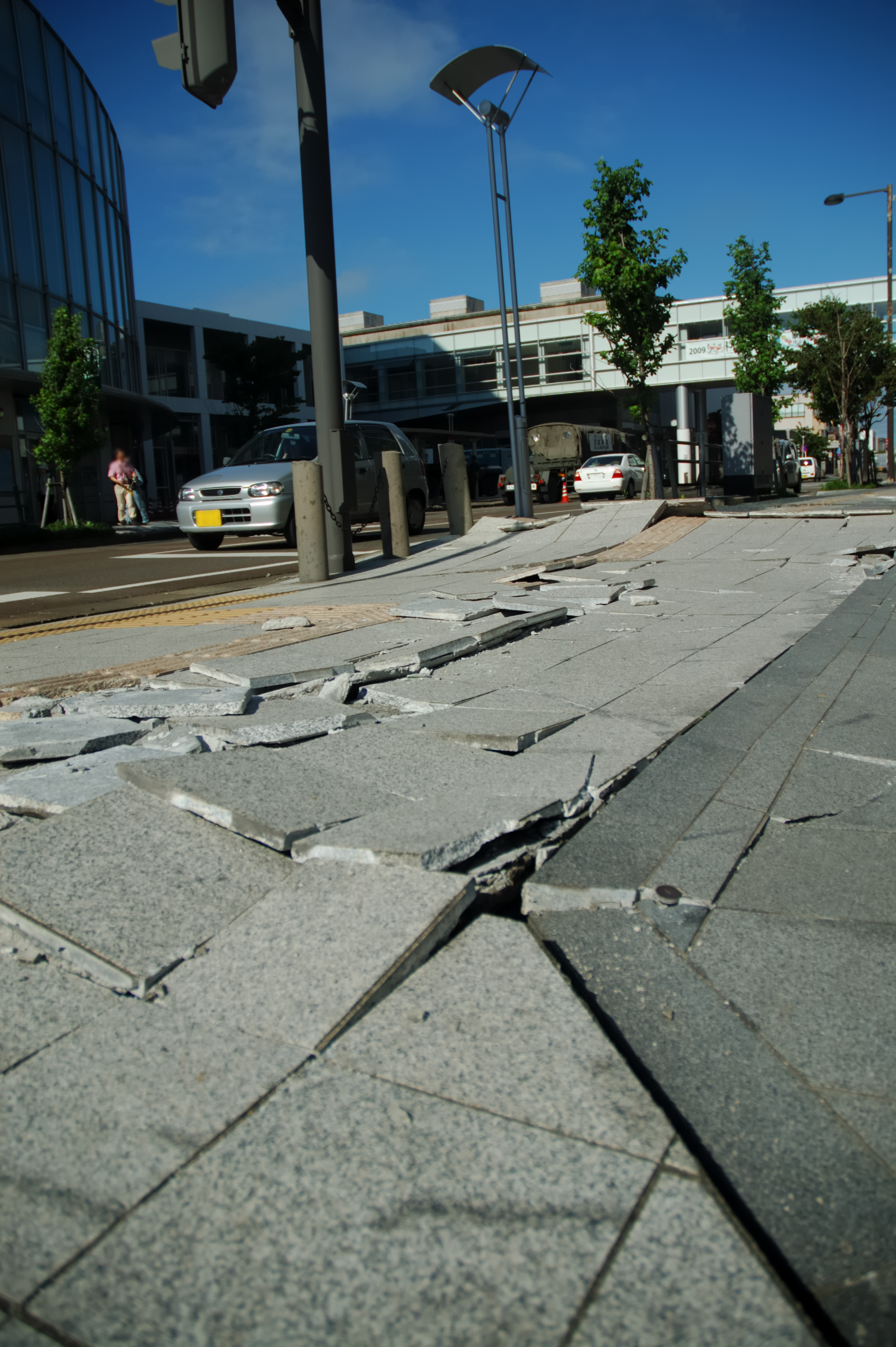 Sidewalk of Higashi-honcho, Kashiwazaki City (柏崎市東本町の歩道)